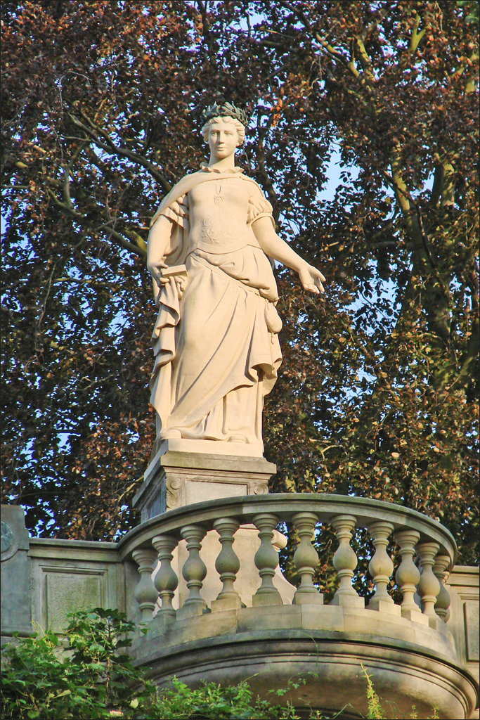 Le monument Borussia au bord du grand lac à Wannsee Ce monument, dans le style de la Renaissance italienne, comprend une allégorie de l'état de Prusse (Borussia) en son sommet. Il a été construit en 1880 comme belvédère donnant sur le lac dans le jardin de la villa Wild sur la rive Est. L'architecte, qui a conçu les plans du monument Borussia, est Ernst Sputh (mort en 1906). Les sculpteurs de l'allégorie sont Eduard Lürssen (1840-1891) et Andreas Lürssen. A proximité de ce monument, un colossal buste de Bismarck a été érigé jusqu'en 1945. Cette rive du lac, où se trouve la station ferroviaire, a commencé à être lotie à partir de 1875 pour accueillir des villas de riches berlinois.